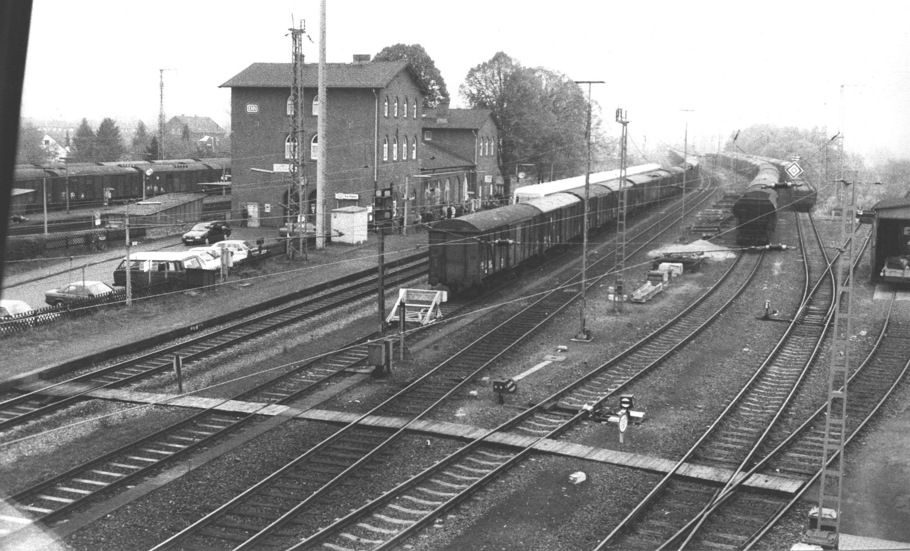 Blick aus dem Fahrdienstleiter-Stellwerk am 31. Oktober 1993 in südlichen Richtung mit den Gleisen 11 (einfahrender VT 628), 12 (mit abgestellten Güterwagen und seit ca. 1988 mit Prellbock), 13 (leer), 15 und 16 mit Güterwagen, 18 als kurzes Stumpfgleis neben Gleis 17 (ganz rechts mit Kleinlokschuppen und abgestellten Skl 53) befindet. Im Hintergrund links die Gleise 3,4 und 5, die mit gedekten Güterwagen beparkt sind. Davor, zwischen den Treppenabgängen der Unterführung, die Hauptgleise 1 und 2. Gleis 14 wurde etwa in den 1950er Jahren zurückgebaut, da der Abstand zwischen den Gleisen zu gering war.